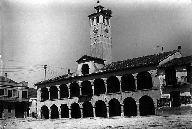 Casa Consistorial - Íscar (Valladolid) - Ediciones Alarde - Oviedo. Fachada del Ayuntamiento. - Tarjeta postal. Papel 137 x 89 B/N